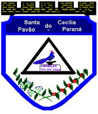 Brasão de Santa Cecília do pavão